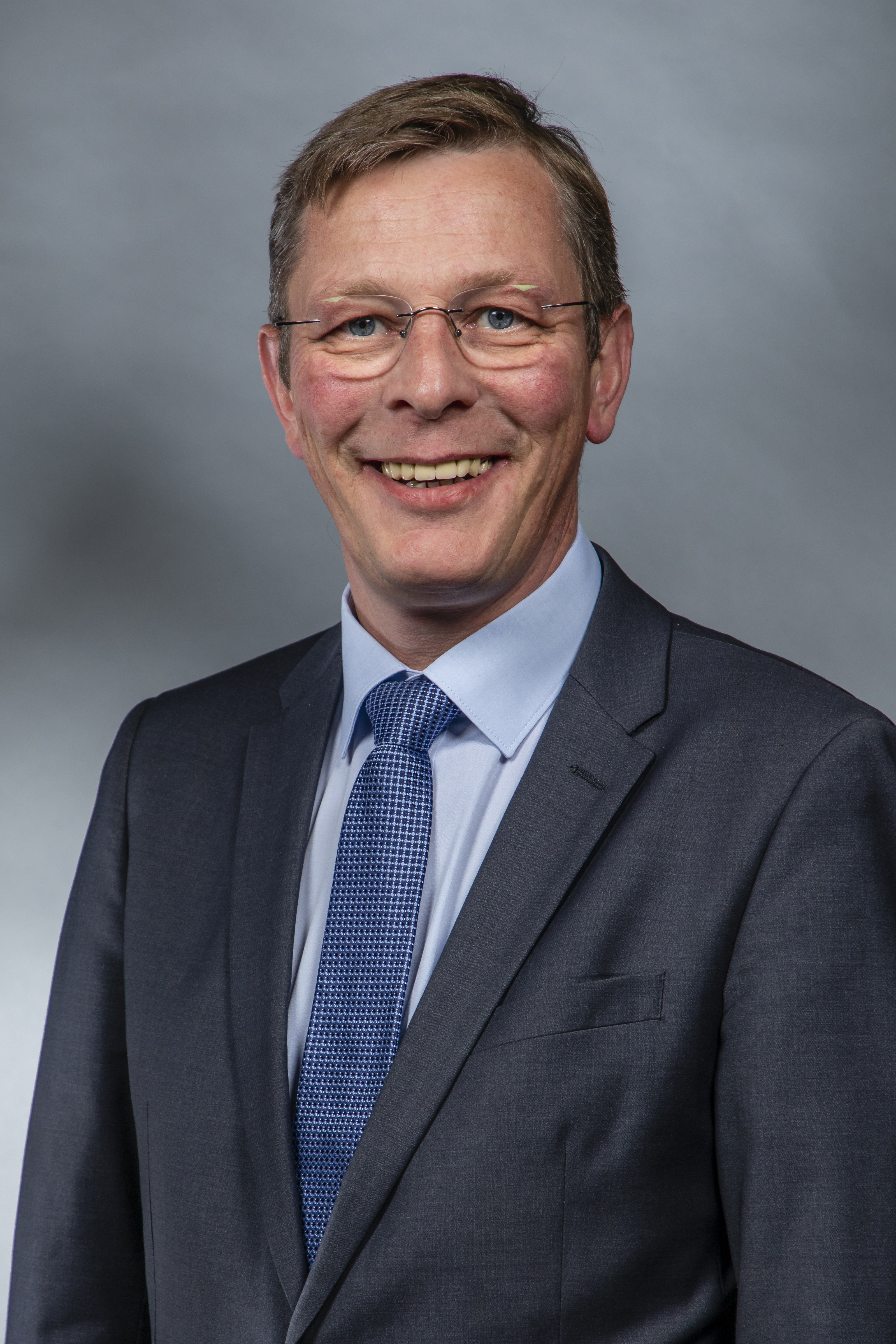 Frank Imhoff